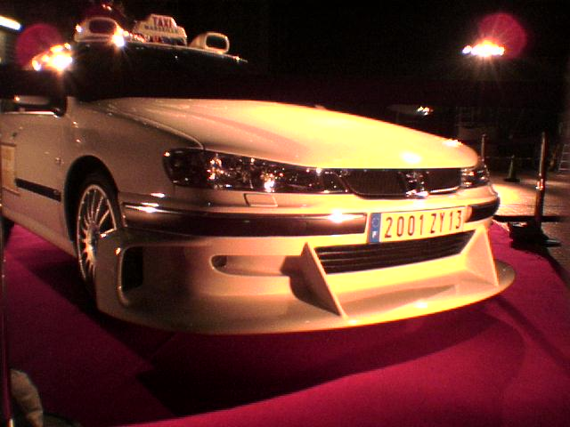 映画TAXi③公開記念でお台場に展示されていたプジョー406です。